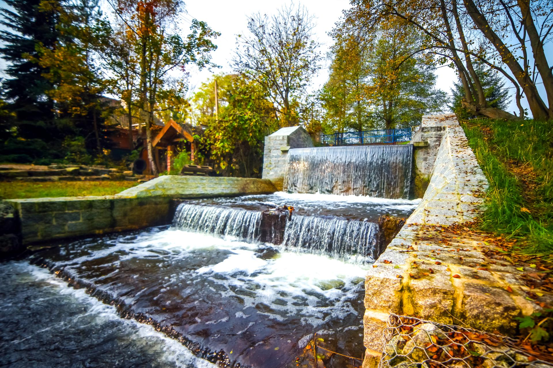 Próg na rzeczce Santocznej